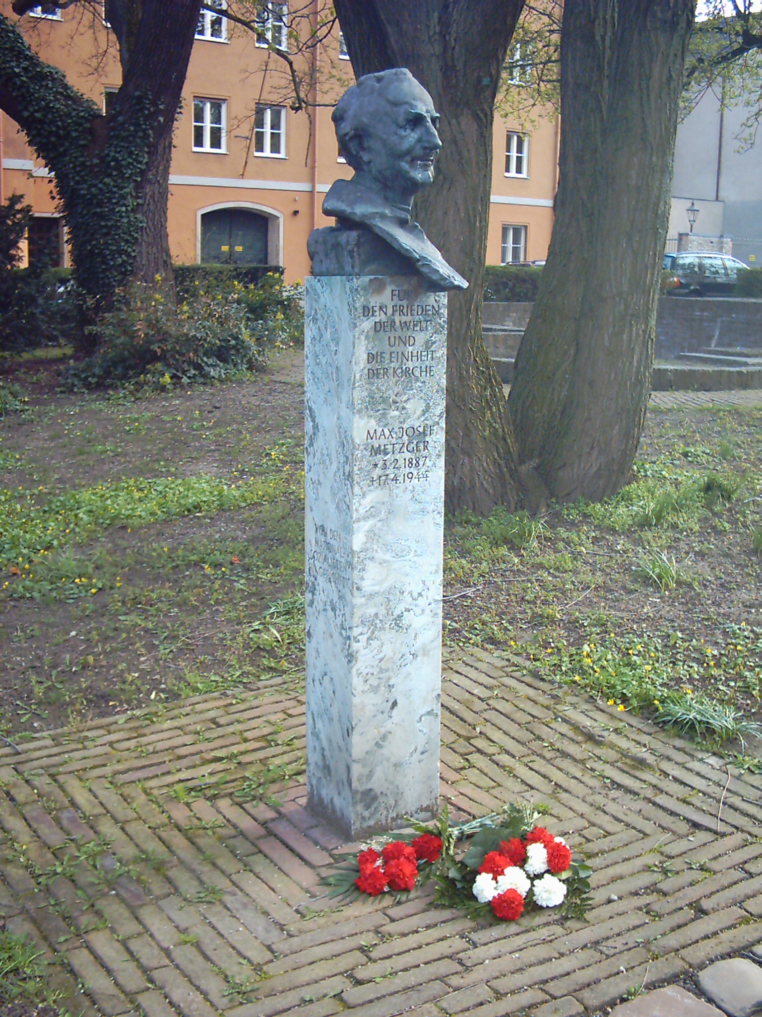 An der Stele vor dem Dom in Augsburg findet jedes Jahr am 17. April um 17 Uhr eine Gedenkfeier statt.